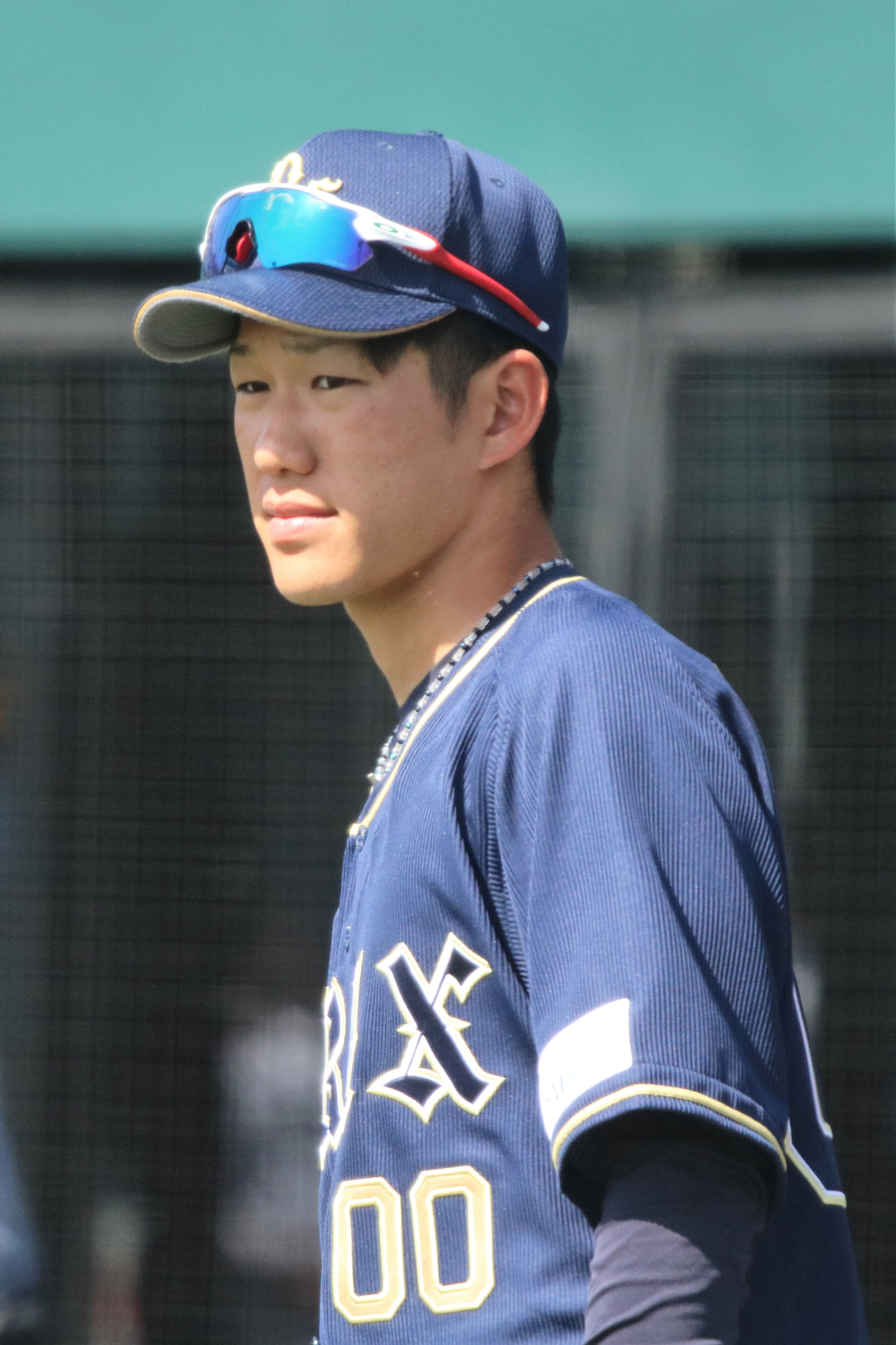 2018/4/20 タマホームスタジアム筑後